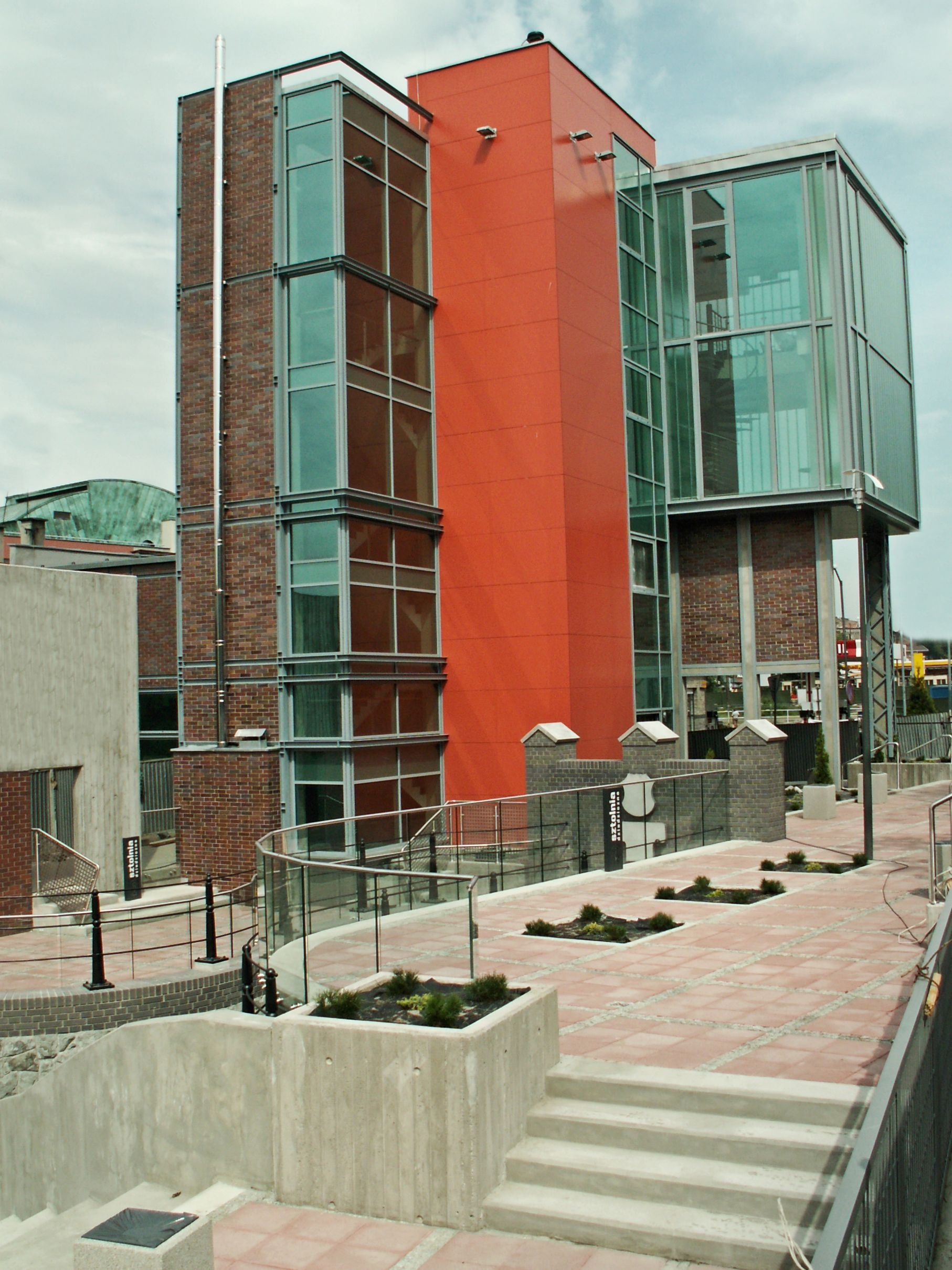 Prace wykończeniowe przy Głównej Kluczowej Sztolni Dziedzicznej